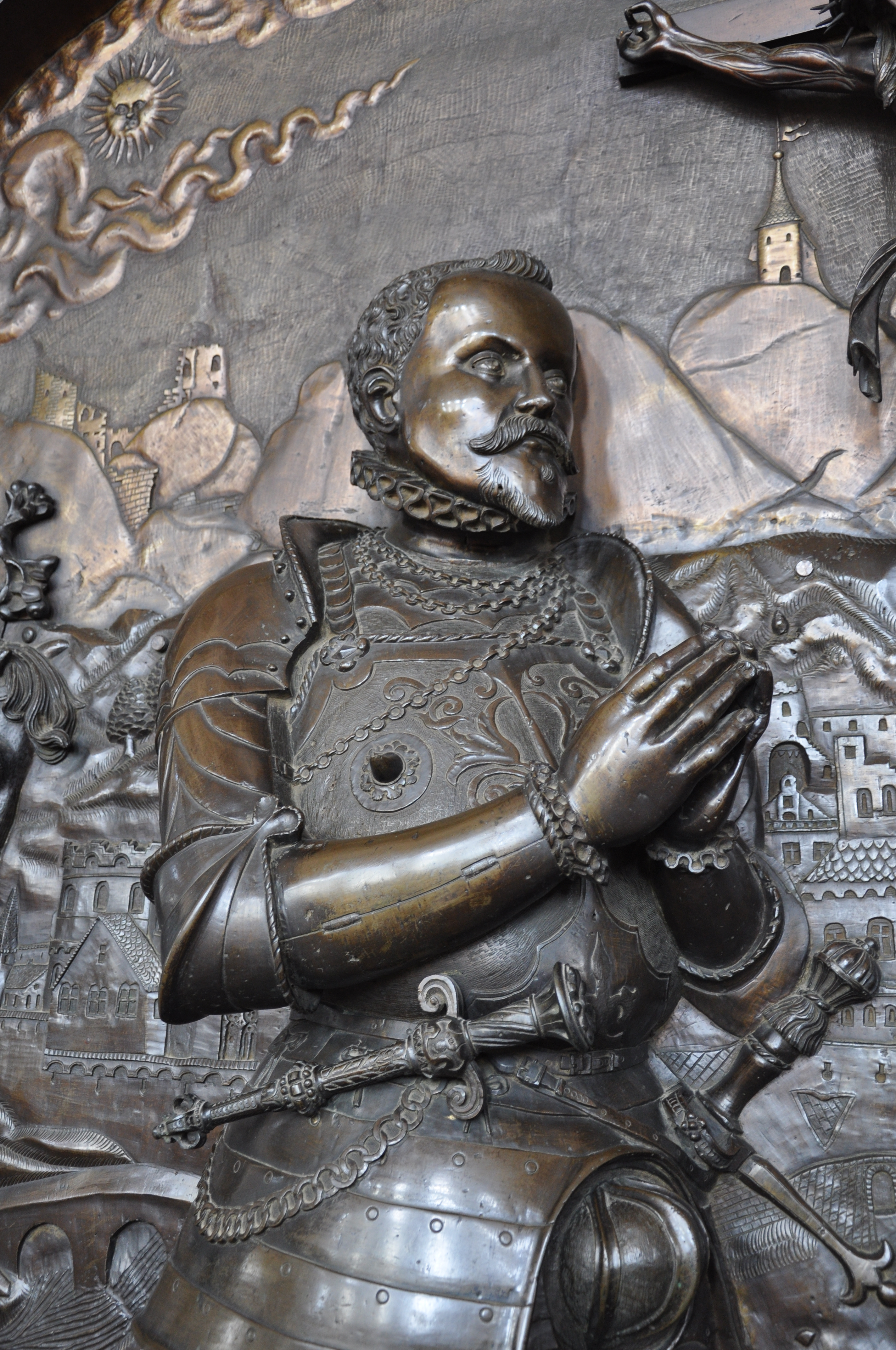 Meßkirch, Pfarrkirche St. Martin, Epitaph Wilhelm von Zimmern, Detail: der betende Wilhelm von Zimmern